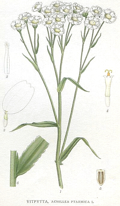 Original Description Vitpytta, Achillea ptarmica L.